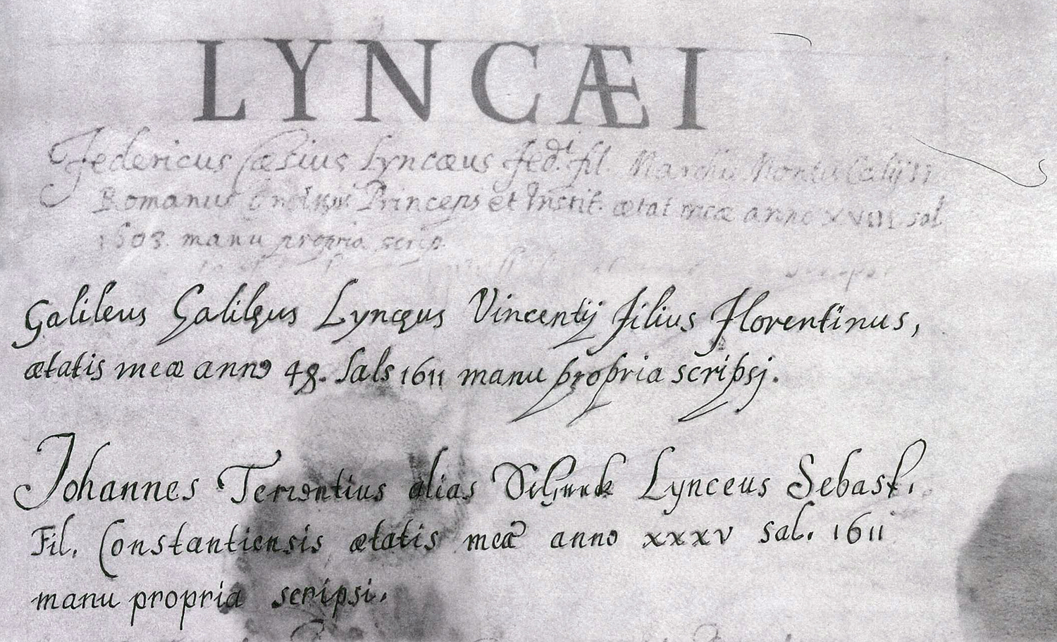 Erste wissenschaftliche Akademie in Europa